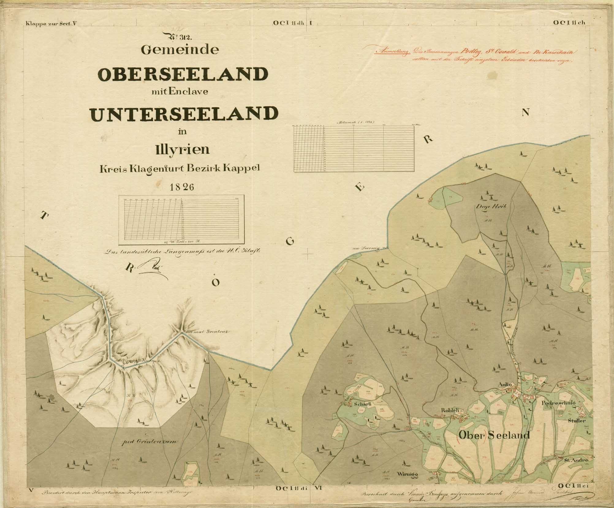 historische Vermessungskarte: franziszeischer Kataster, 1826, Gemeinde Seeland, damals Kärnten, heute Jezersko, Slowenien